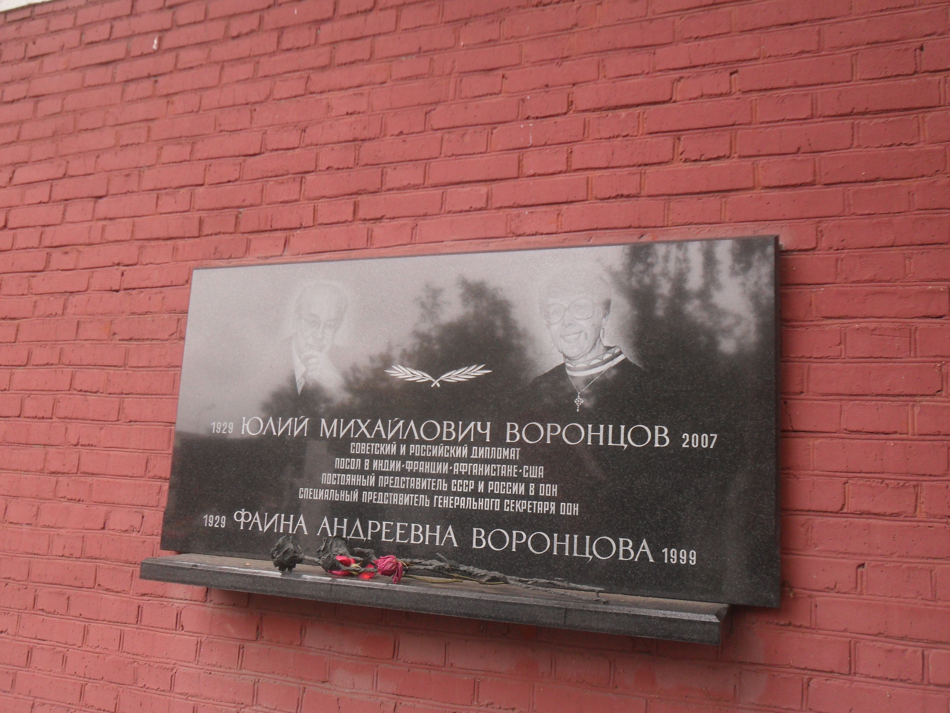 Плита колумбария дипломата Юлия Воронцова на Новодевичьем кладбище Москвы.